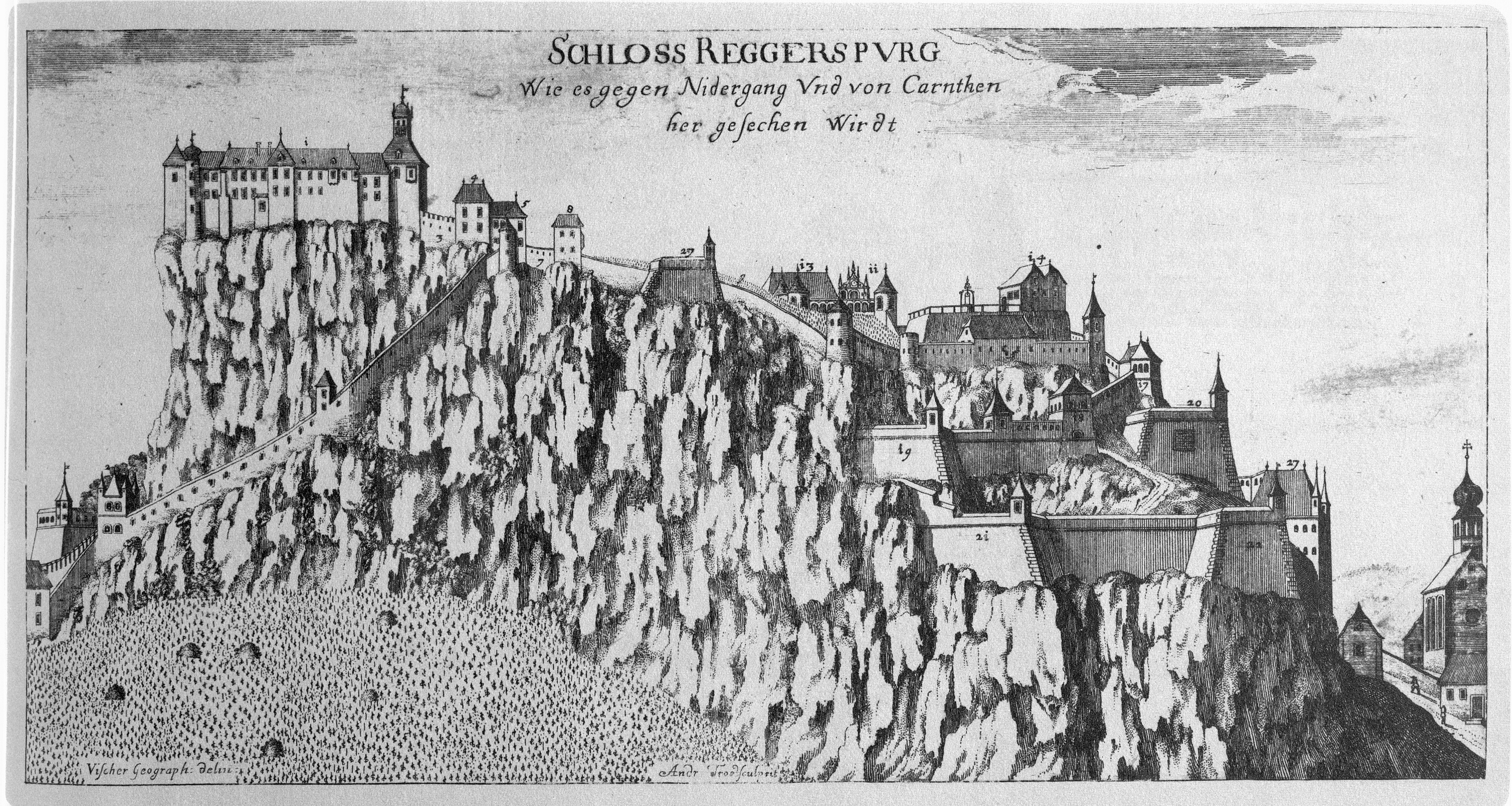 G. M. Vischers Käyserlichen Geographi, Topographia Ducatus Stiriae, Das ist: Eigentliche Delineation / und Abbildung aller Städte / Schlösser / Marcktfleck / Lustgärten / Probsteyen / Stiffter / Clöster und Kirchen / so es sich im Herzogthumb Steyrmarck befinden; Und anjetzo Umb einen billichen Preyß zu finden seynd Bey Johann Bitsch Universitäts Buchhandlern / Auff dem Juden=Platz bey der guldenen Saulen. Graz 1681 Die Nummerierung der Dateien folgt der alphabetischen Reihung der Ortsnamen und entspricht nicht dem Vischer-Register